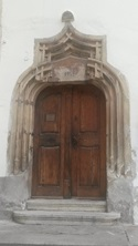 pohľad na portál